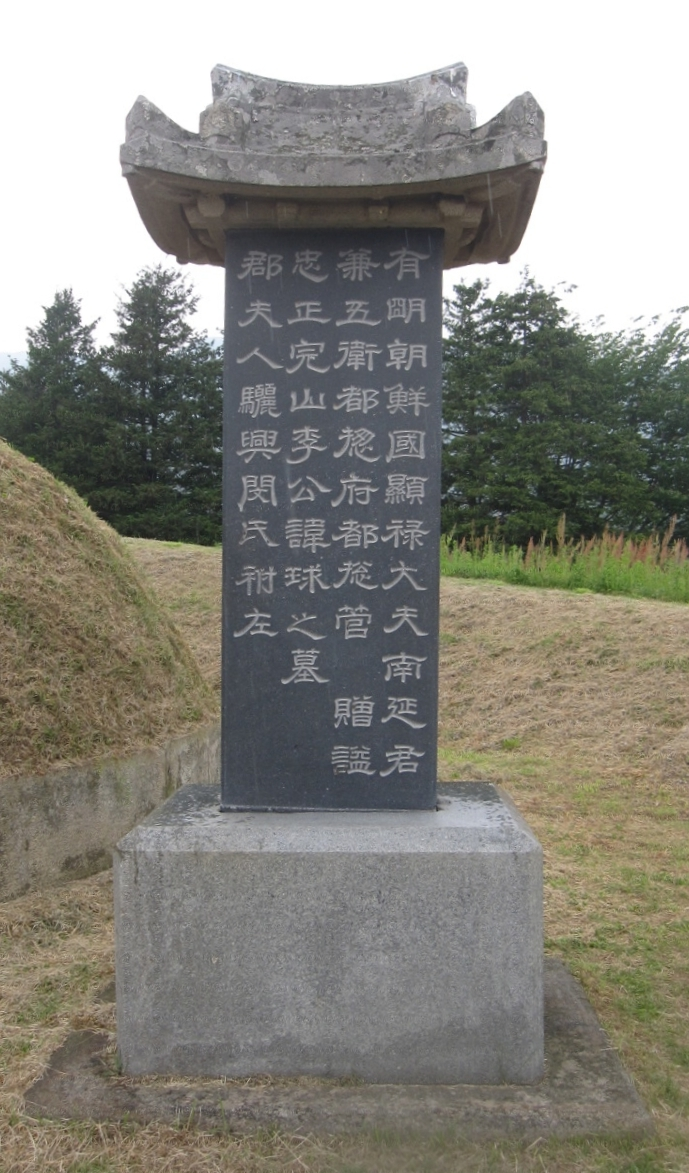 李球神道碑